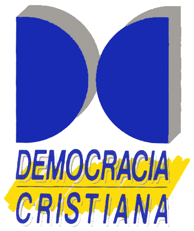 Logotipo de la Democracia Cristiana española en 1988.